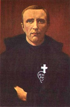 Photo' of Blessed Isidore de Loor Kunstenaar Michel De Loore Op dit werk rusten auteursrechten!